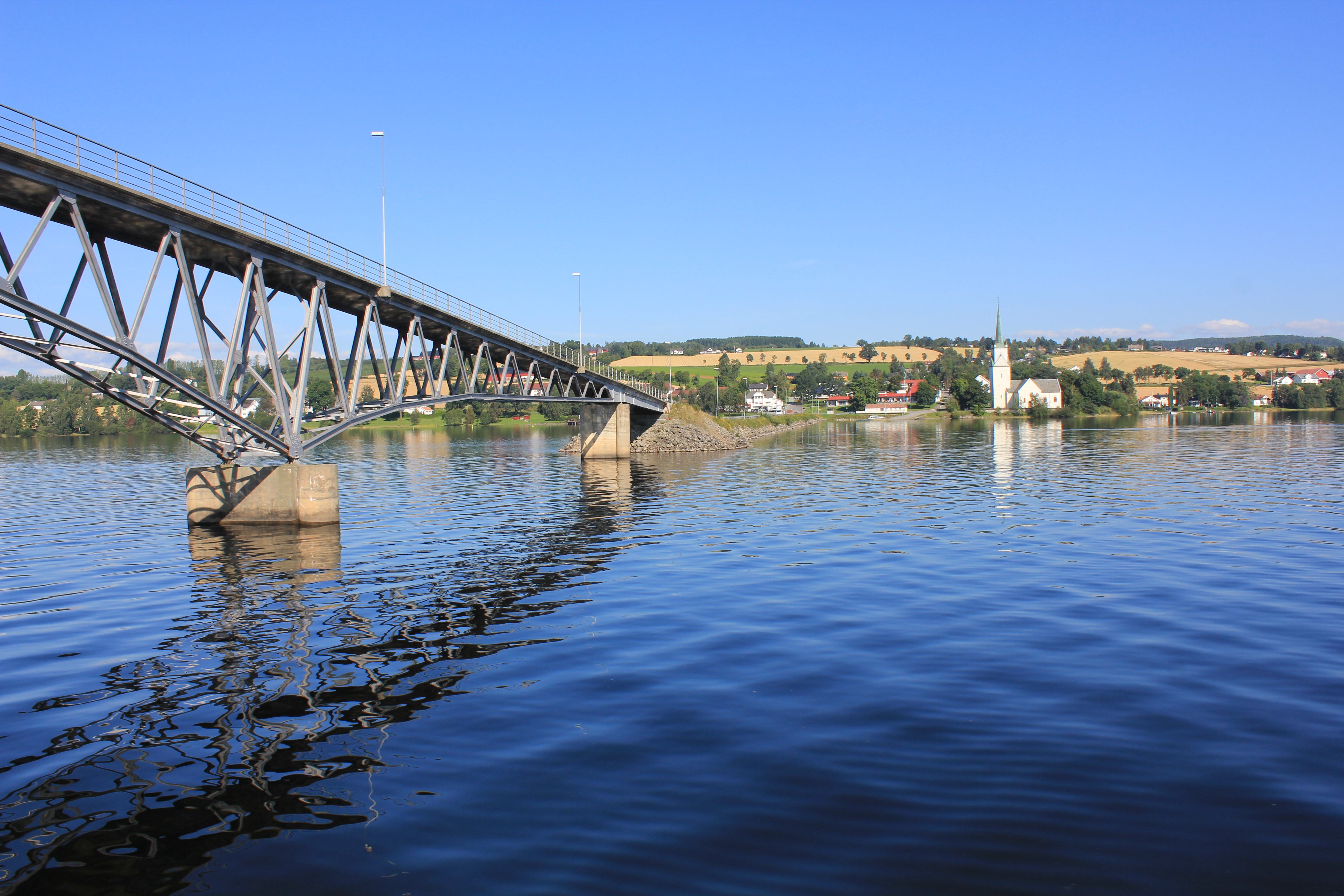 Nes på Ringsaker med Nes kirke.